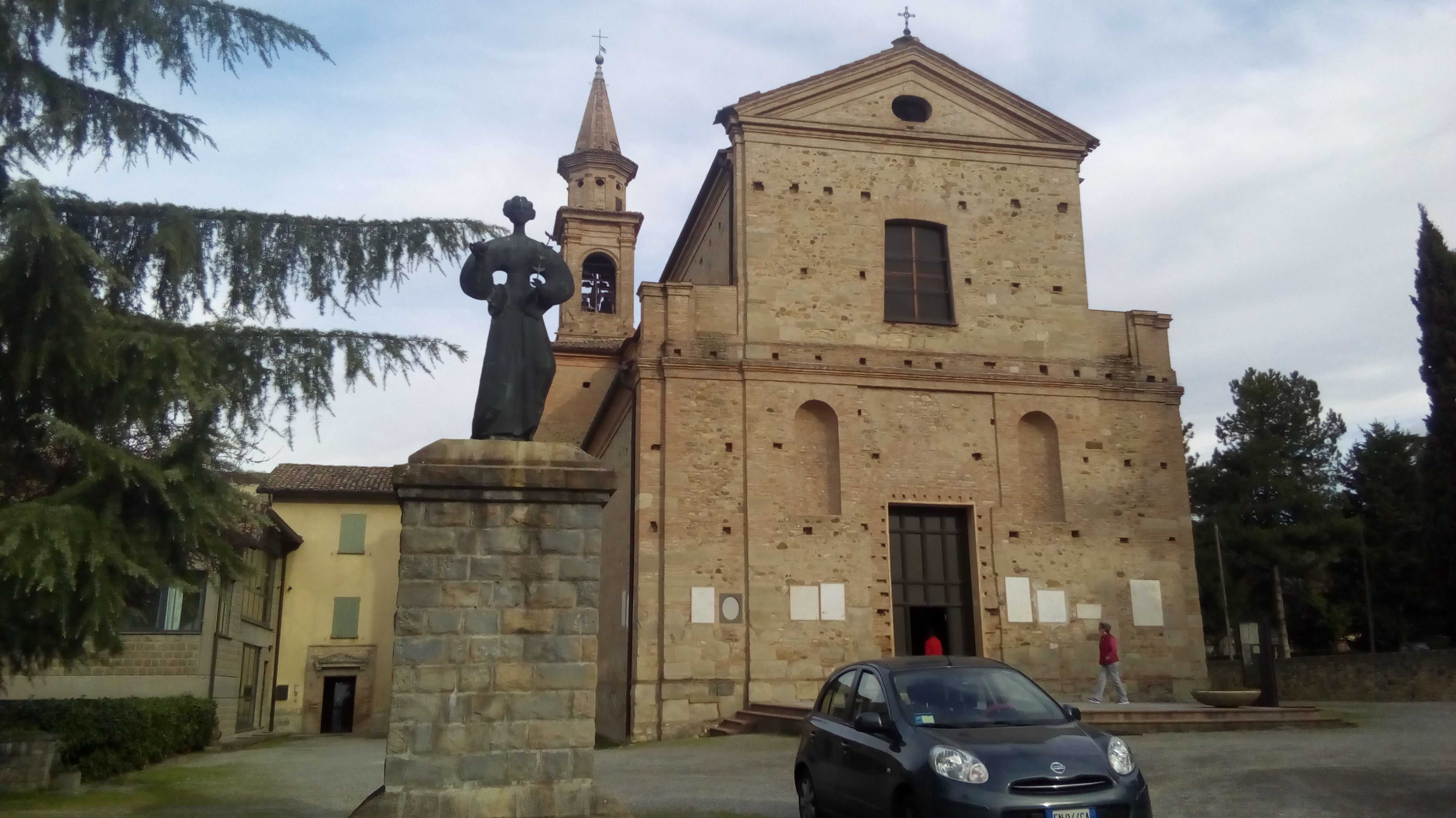 Quattro Castella (Reggio Emilia)